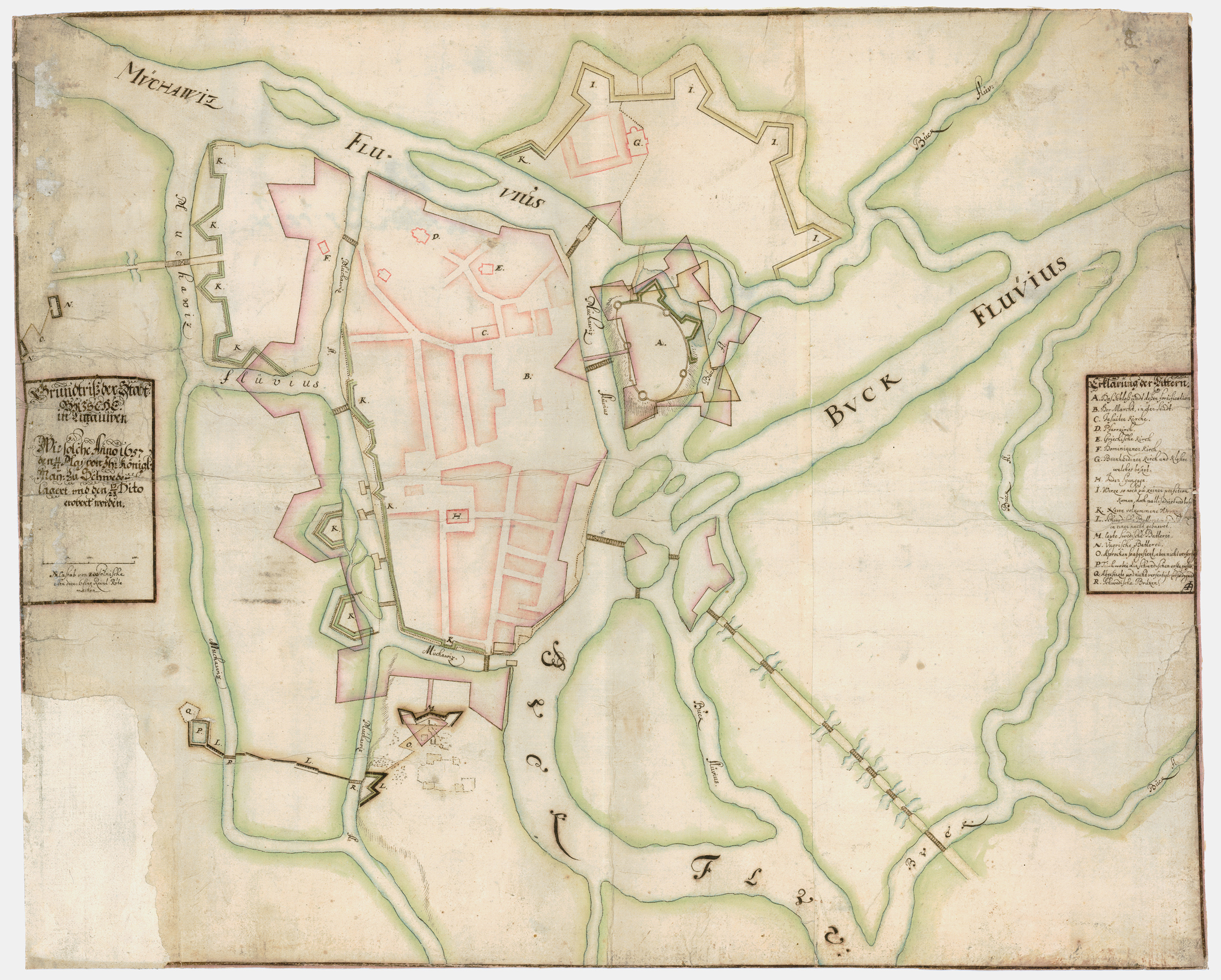 Беларуская (тарашкевіца): Берасьце (Bieraście). Плян места. Grundtriß der Stadt Brische in Littauwen Wie solche Anno 1657 den 11/21 Maÿ von Ihr Königl. Maÿ: zu Schweden belagert und den 13/23 Dito erobert worden, Krigsarkivet, 0425:05:139